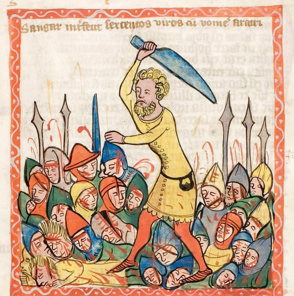 Speculum Humanae Salvationis, Westfalen oder Köln, um 1360. ULB Darmstadt, Hs 2505, fol. 31r oben: Sangor (Schamgar)